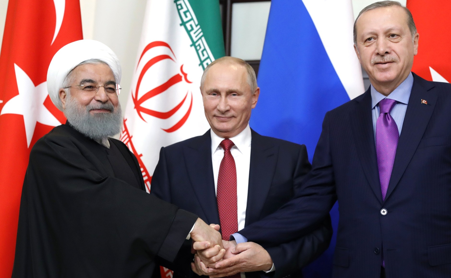 Встреча Президента России Владимира Путина с Президентом Ирана Хасаном Рухани и Президентом Турции Реджепом Тайипом Эрдоганом в Сочи. Переговоры посвящены проблематике сирийского урегулирования.